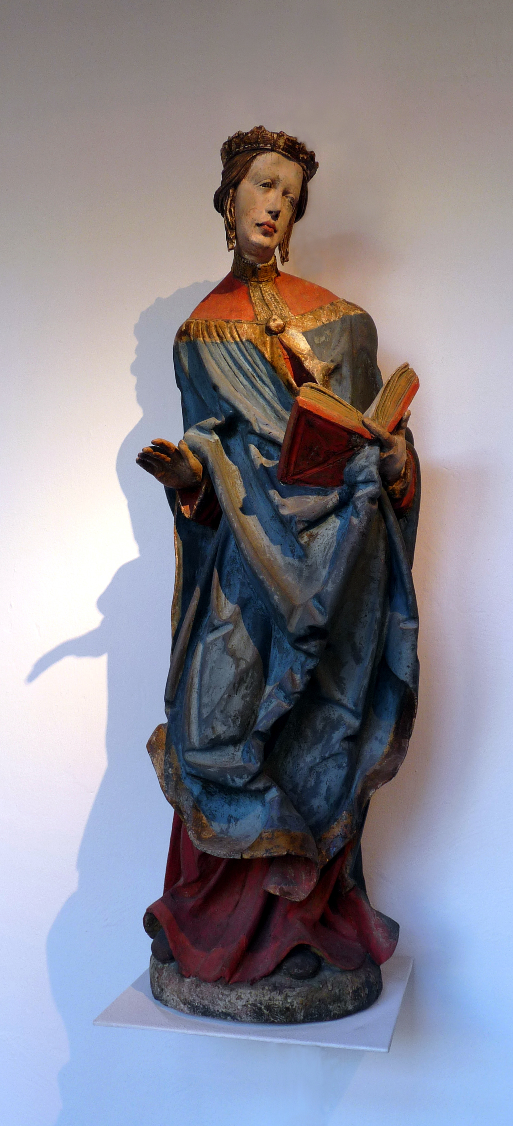 Statue en bois polychrome et doré de Sainte Elisabeth de Hongrie, au Musée de l'Oeuvre Notre-Dame, Strasbourg. Bavière, vers 1520, atelier de Hans Leinberger (entourage)